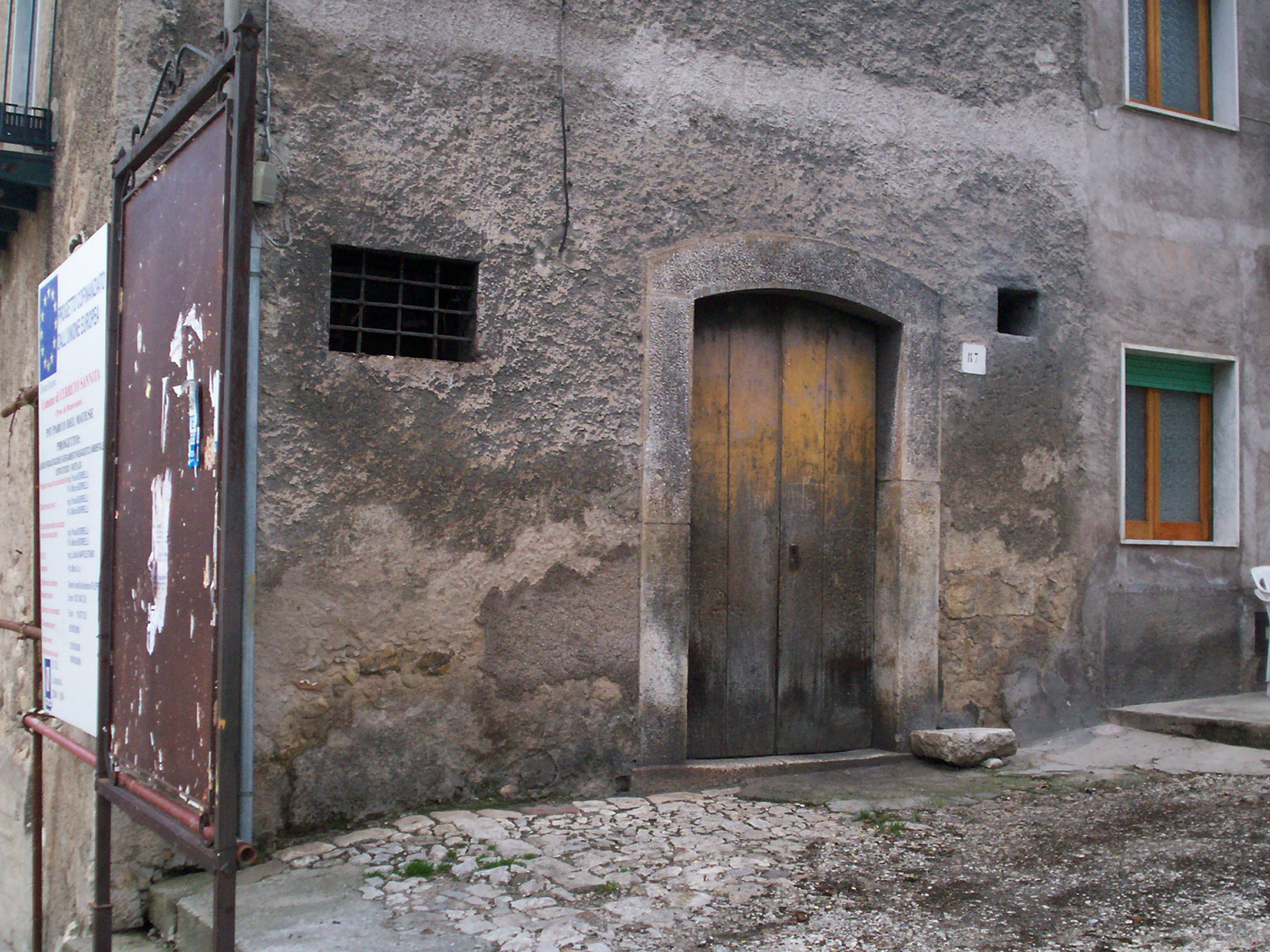 particolare dell'esterno della vecchia fucina, Cerreto Sannita (Bn)